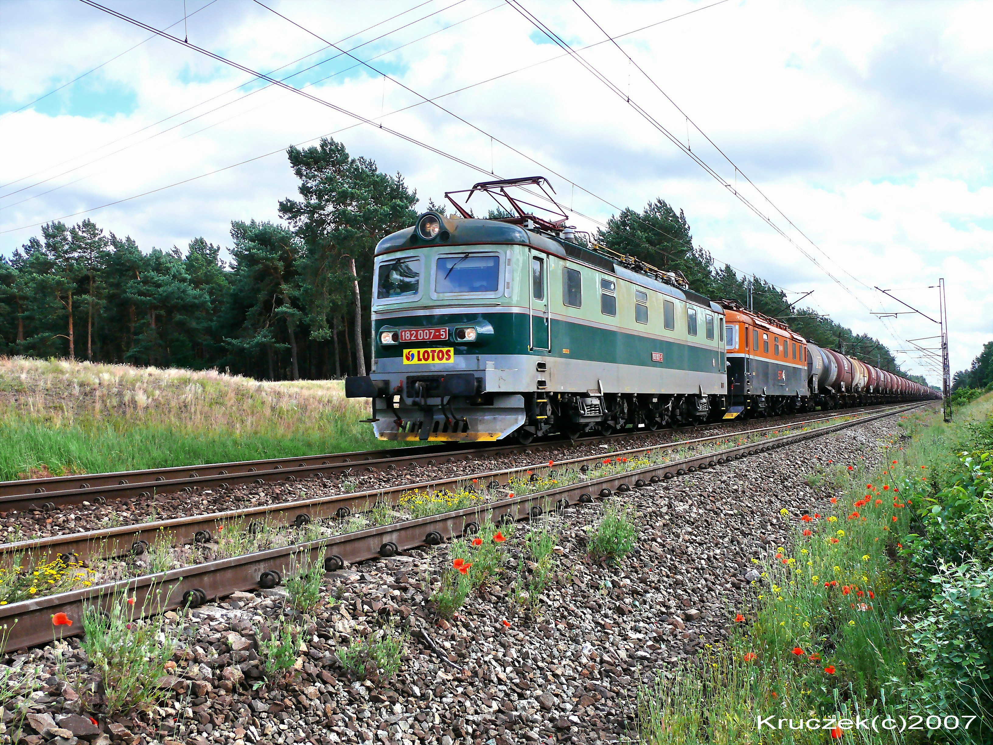 Lokomotywa elektryczna 182 002-6 przewoźnika Lotos Kolej jedzie w kierunku stacji kolejowej Bydgoszcz Główny.